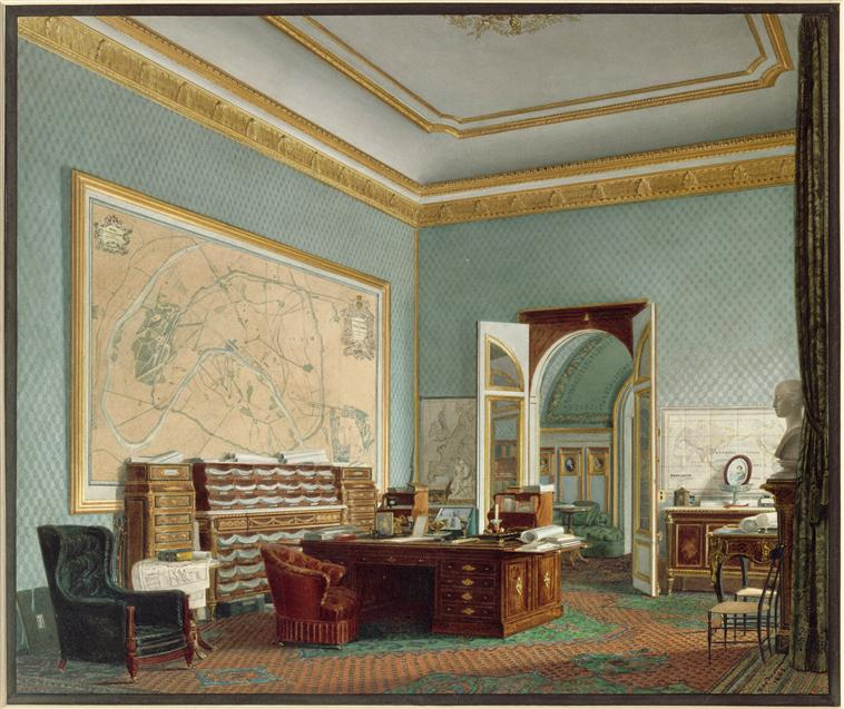 Le Cabinet de travail de l'empereur Napoléon III, aux Tuileries